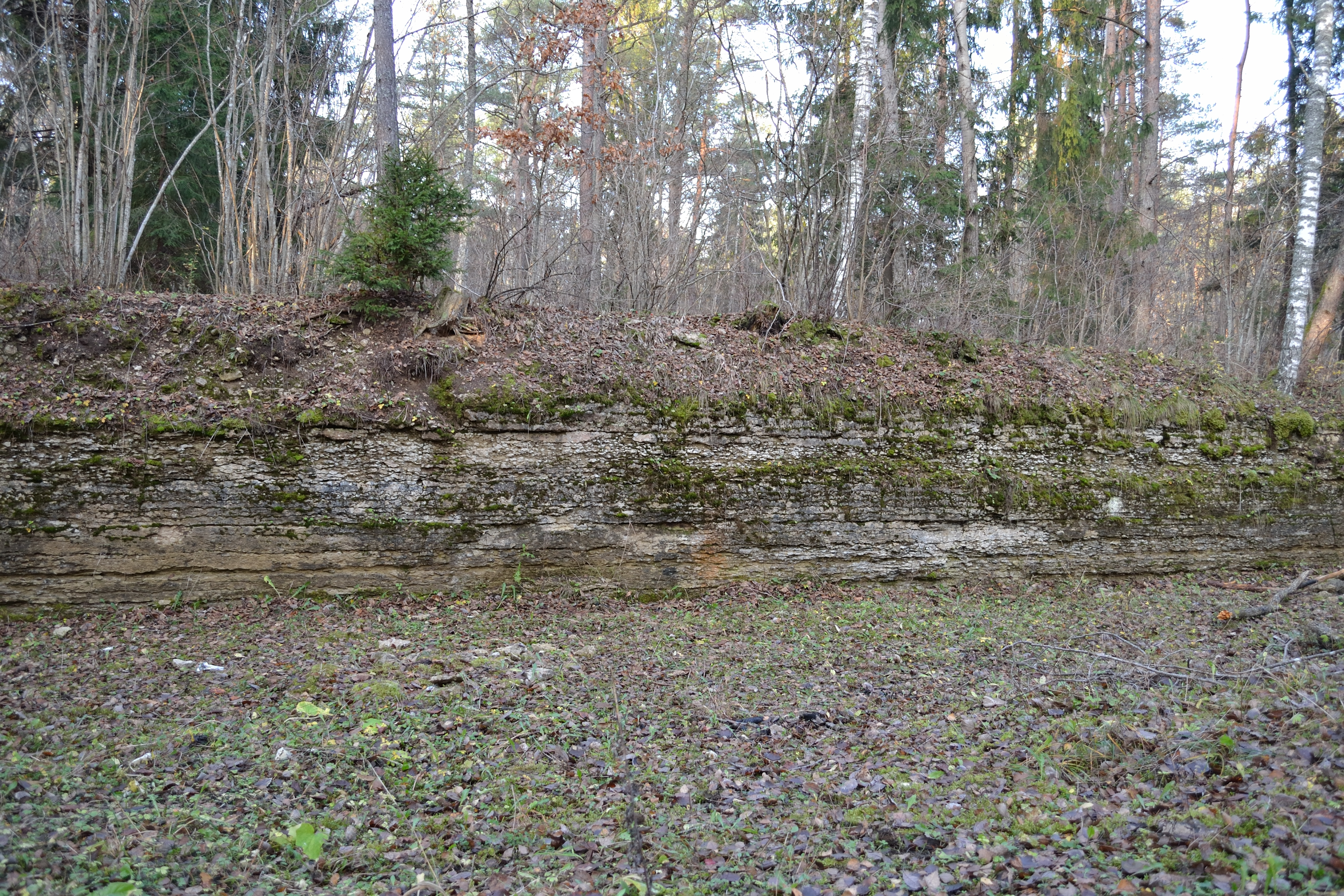 Keila lademe tüüppaljand Keilas